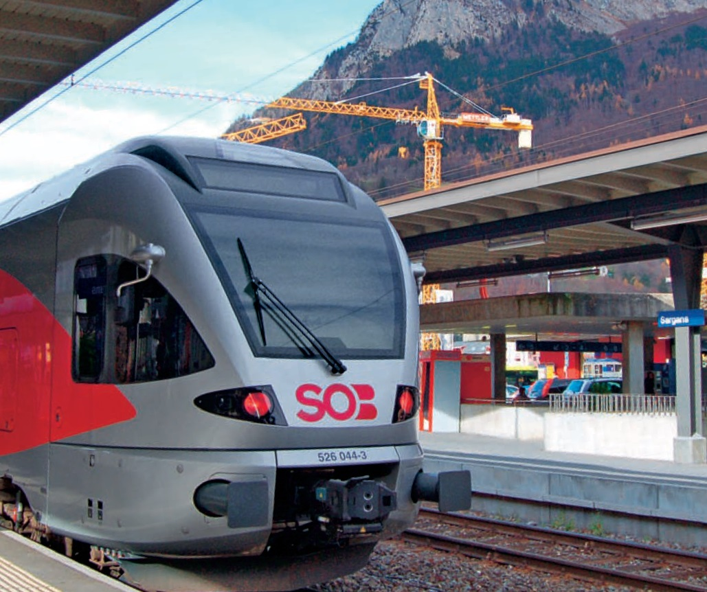 Flirt der Südostbahn als S4 im Bahnhof Sargans. Seit 2013 kommt die Südostbahn im Netzzugang mit Reisezügen nach Sargans.